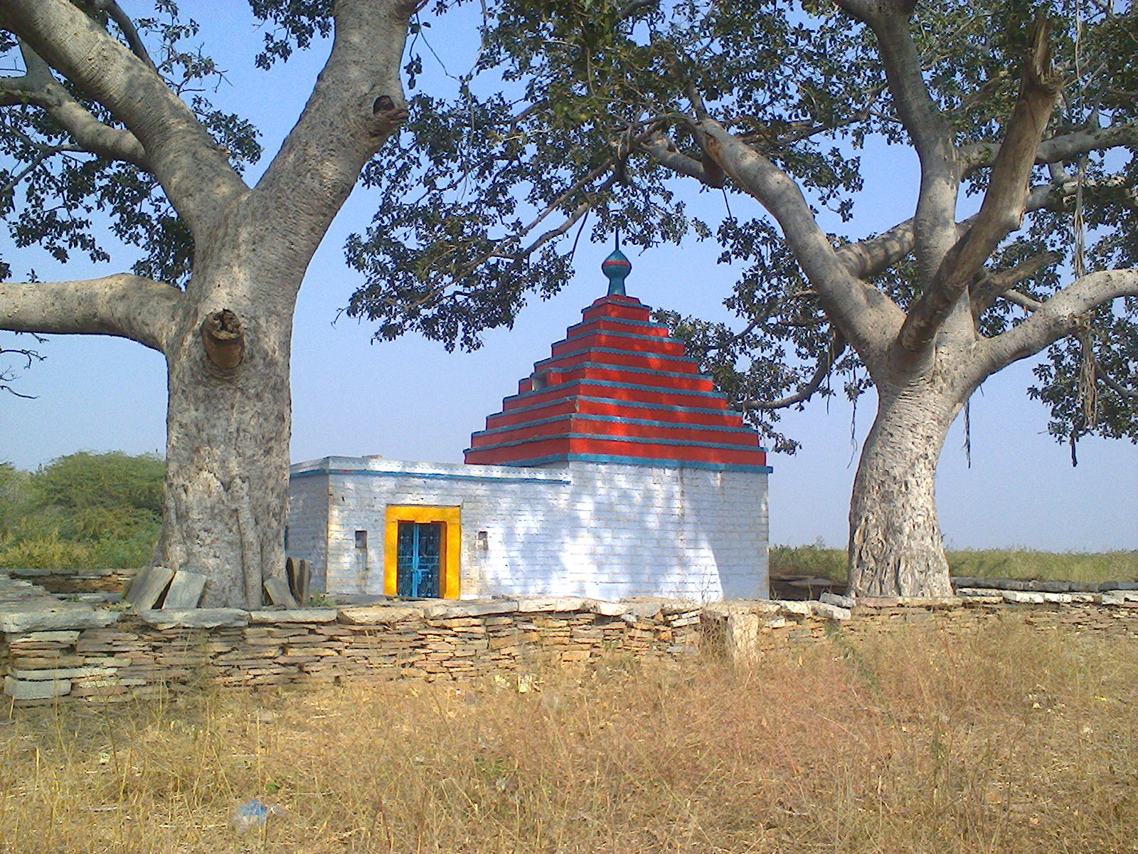 ఆంజనేయస్వామి దేవాలయం, బసాపురం